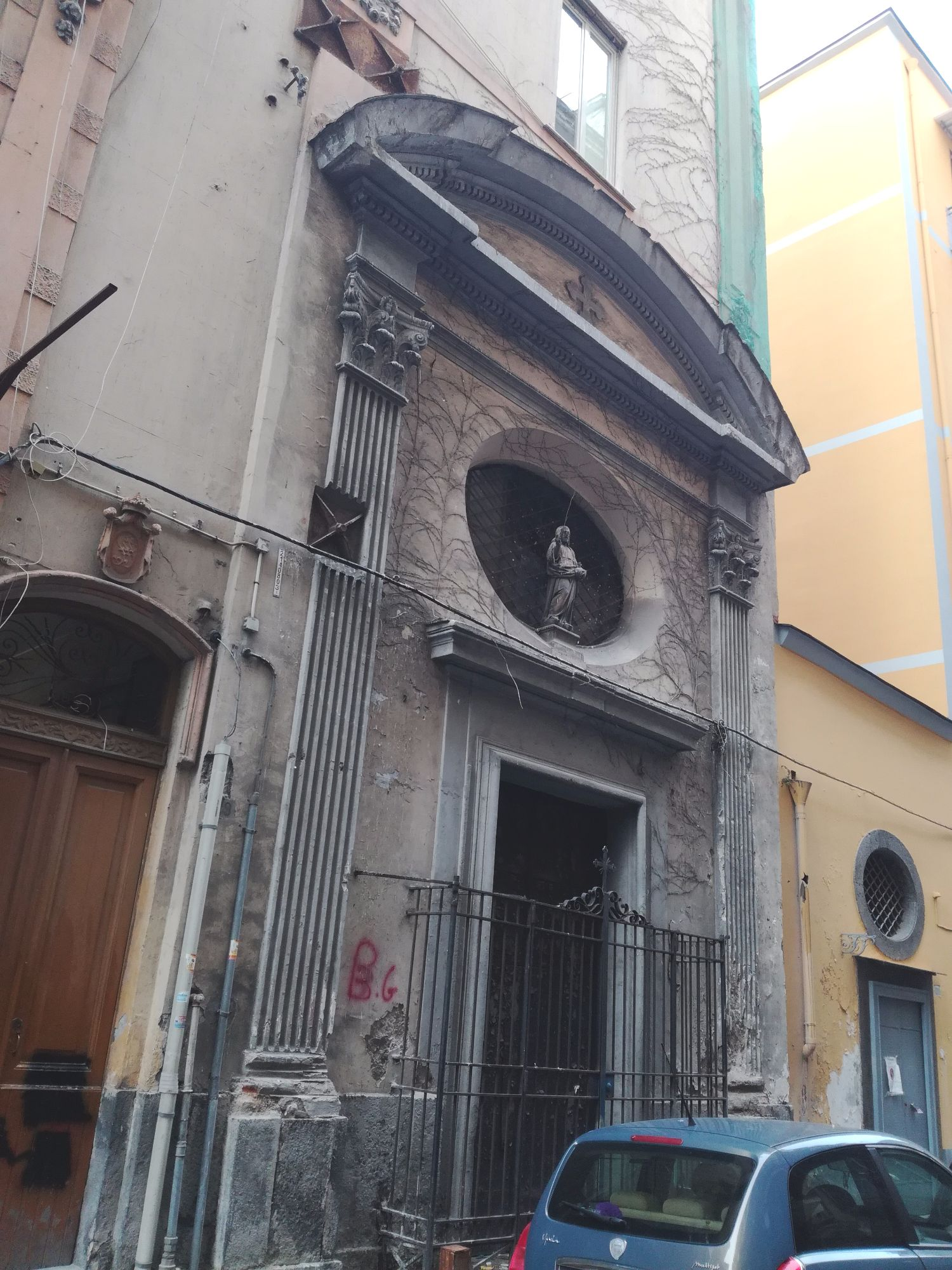 Chiesa di Sant'Eligio dei Chiavettieri